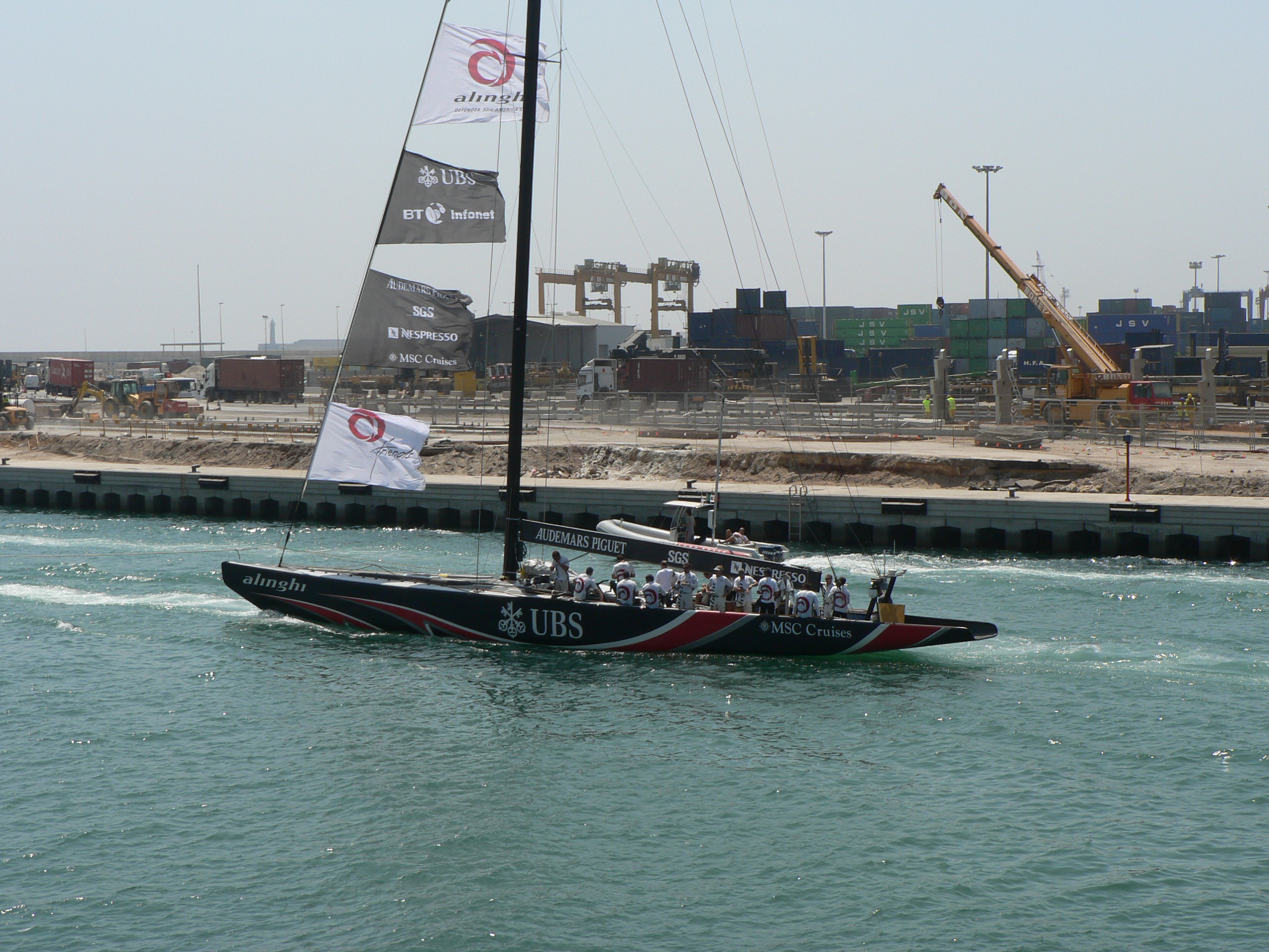 Coupe de l'America 2007 - Alinghi